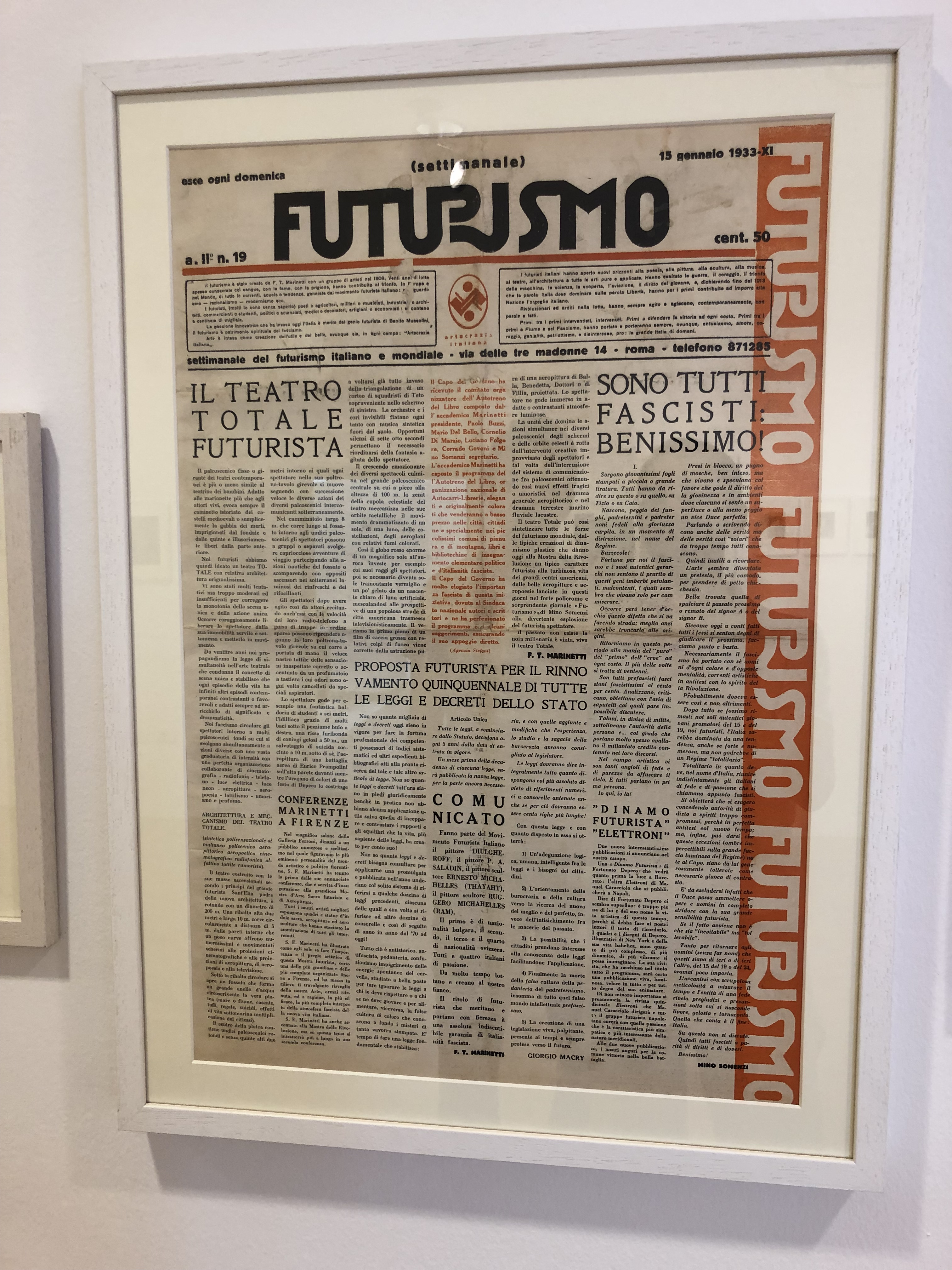 Rivista Futurismo